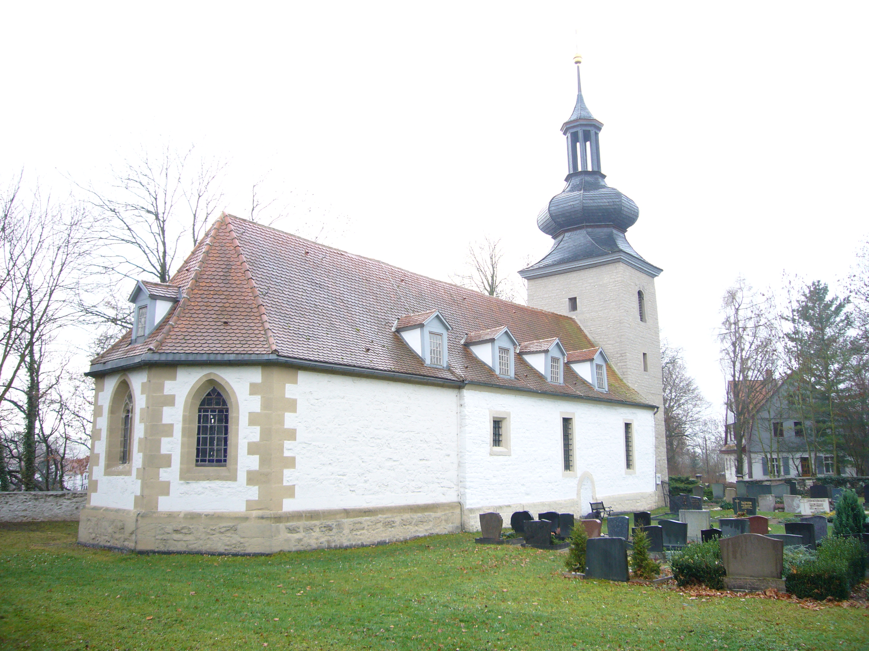 Kirche von Möbisburg.